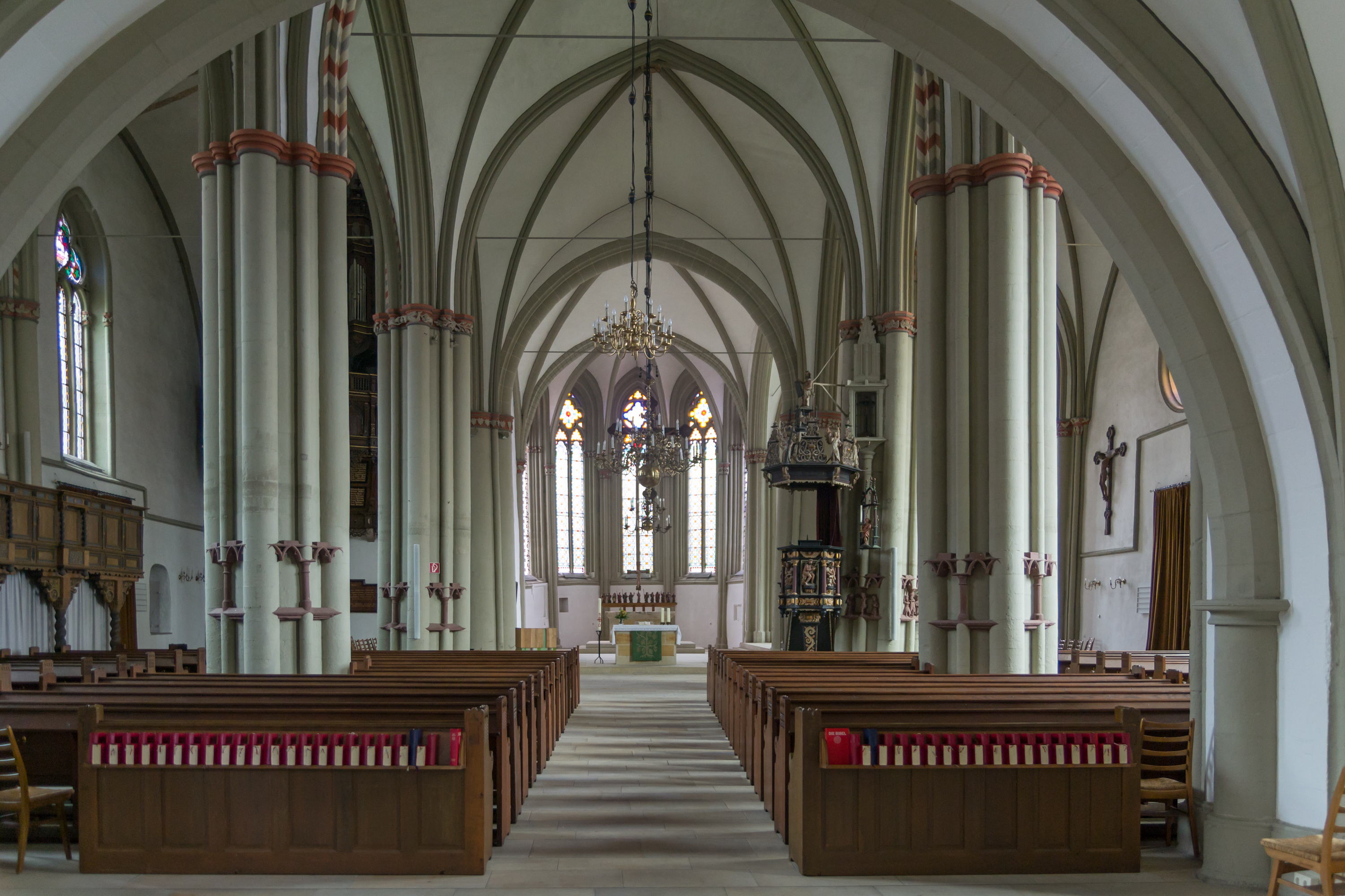 This image shows a heritage building in Germany, located in the North Rhine-Westphalian city Lemgo. Langhaus der evangelisch-lutherischen Kirche St. Marien in Lemgo